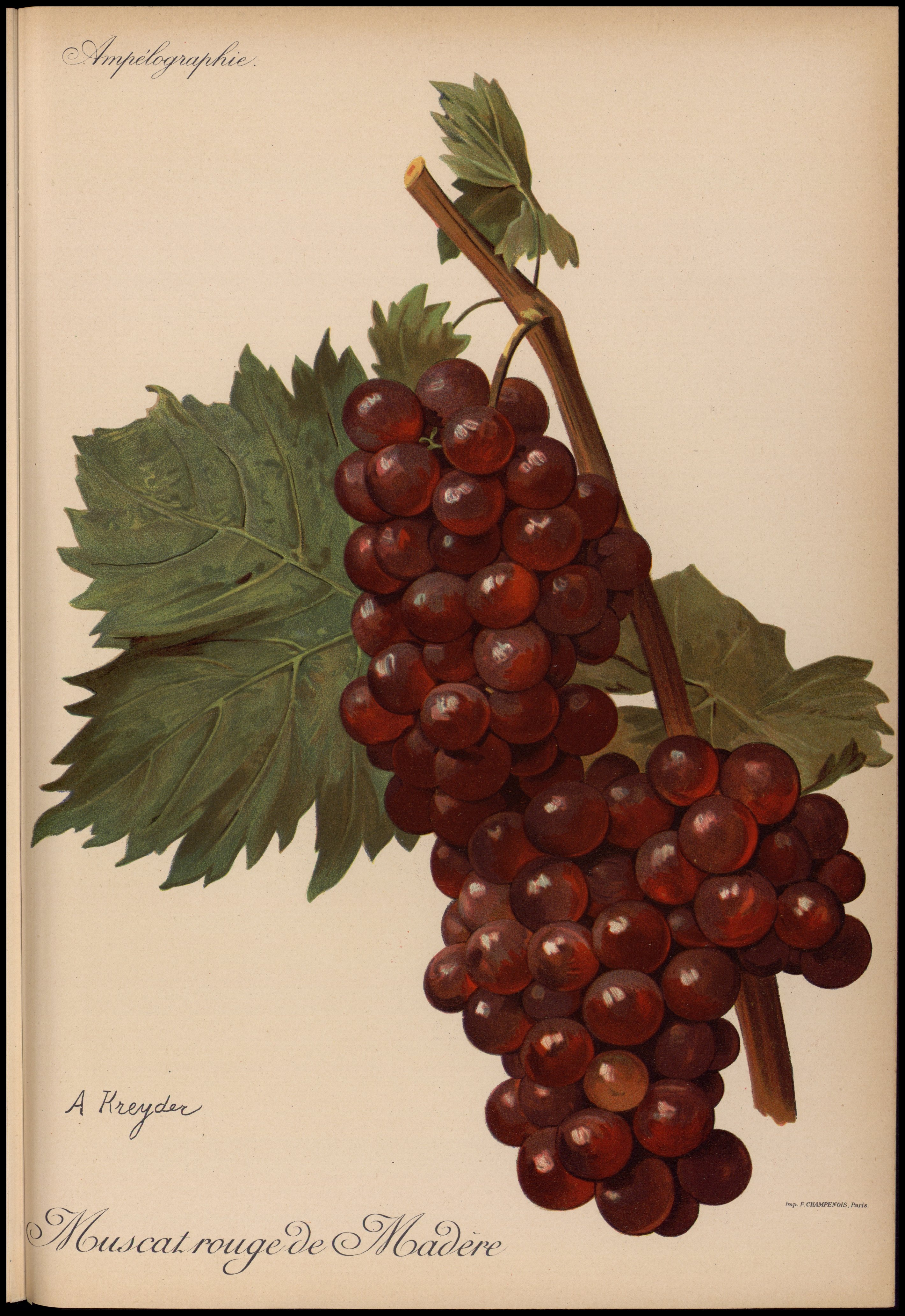 Issue du livre Ampélographie : traité général de viticulture. tome III.